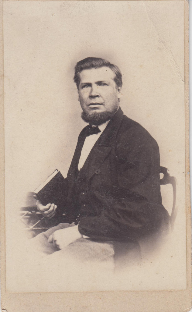 Koolmeister ja ühiskonnategelase Joosep Kapi portreefoto